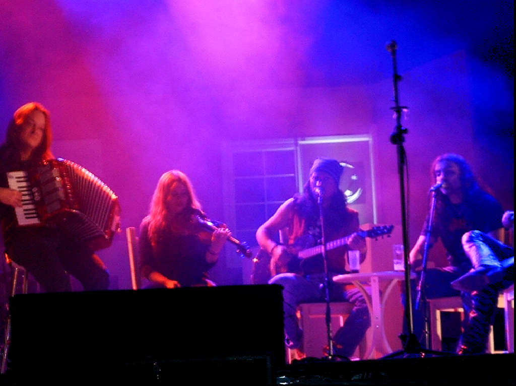 La Fuga en acústico en la sala Multiusos del Auditorio, en Zaragoza.